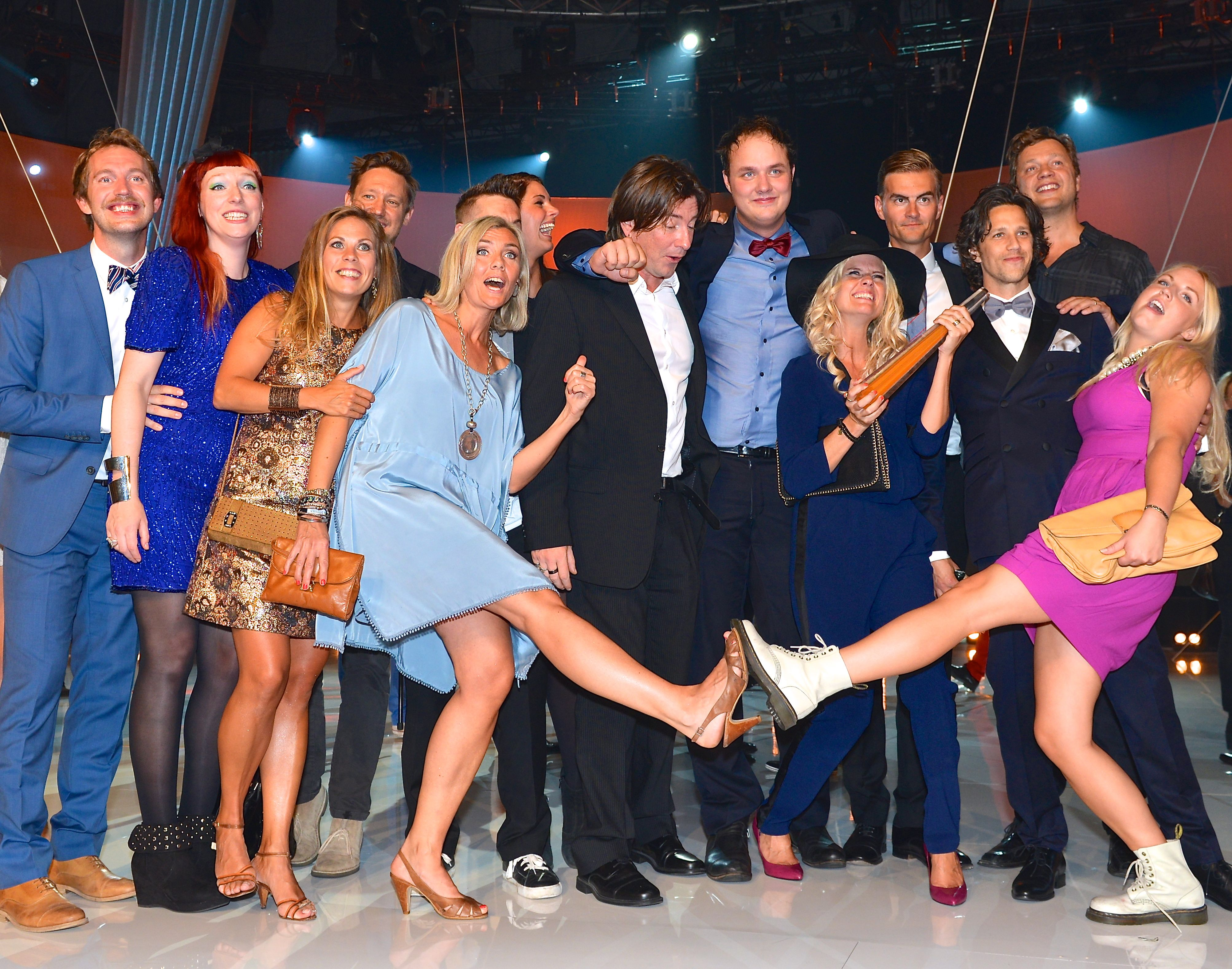 Vinnarna av Kristallen för Årets humorprogram, Partaj från Kanal 5, på Kristallengalan den 30 augusti 2013.